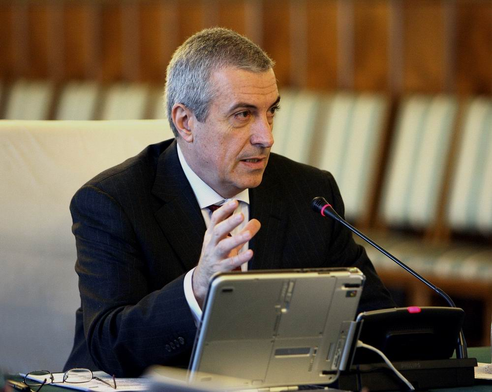 Călin Popescu-Tăriceanu at a government meeting